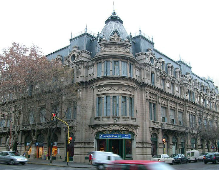 Argentine Club, Bahía Blanca, Buenos Aires Province, Argentina